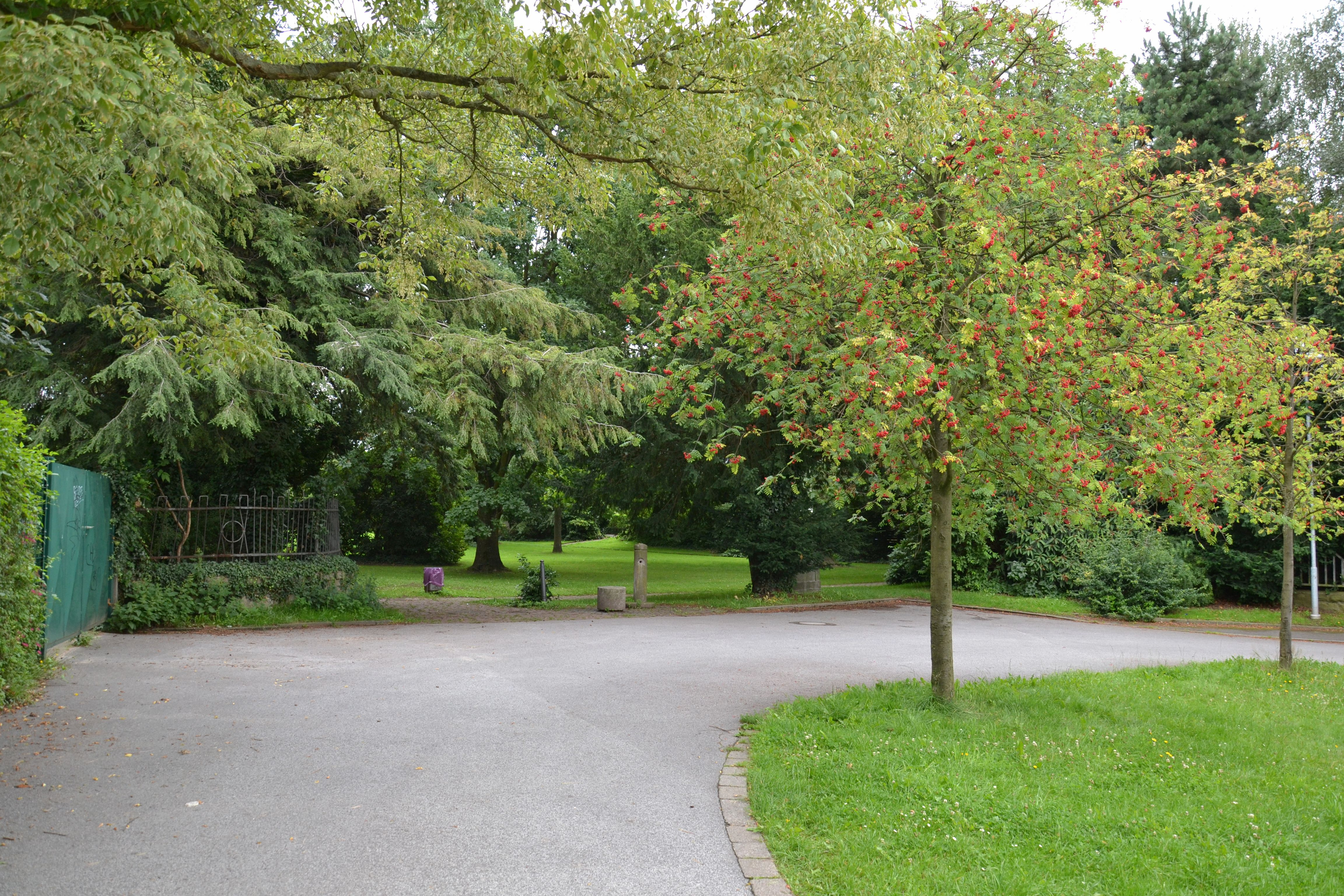 Alter Friedhof Huttrop in Essen-Huttrop - ehem. Haupteingang von Westen